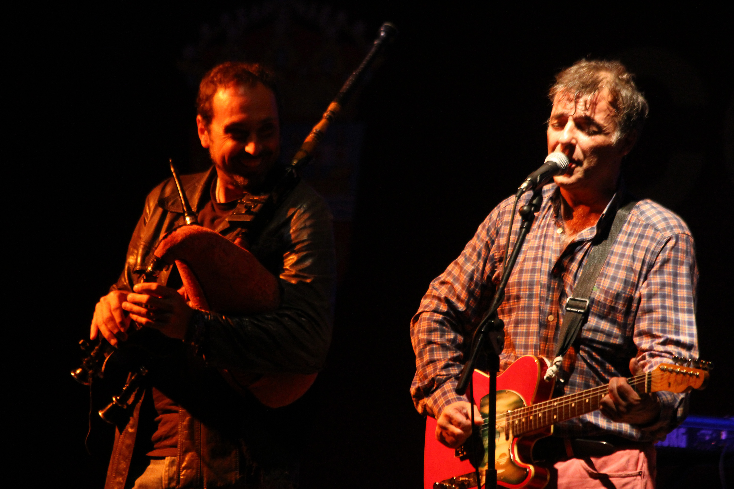 Concierto de Los Limones en Bayona (Pontevedra) el 18 de agosto de 2012.